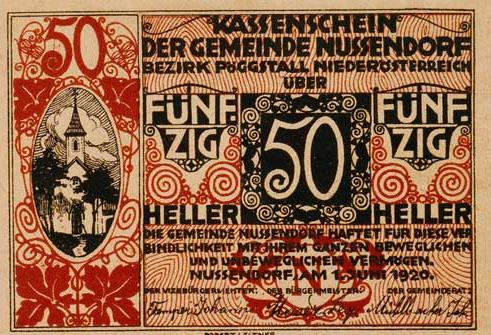 Notgeld (dinheiro de emergência, emitido em períodos de guerra) de Nussendorf, no valor de 50 Heller, de 1920. Obra ROUBADA do Museu Paulista (ou do Ipiranga, São Paulo).